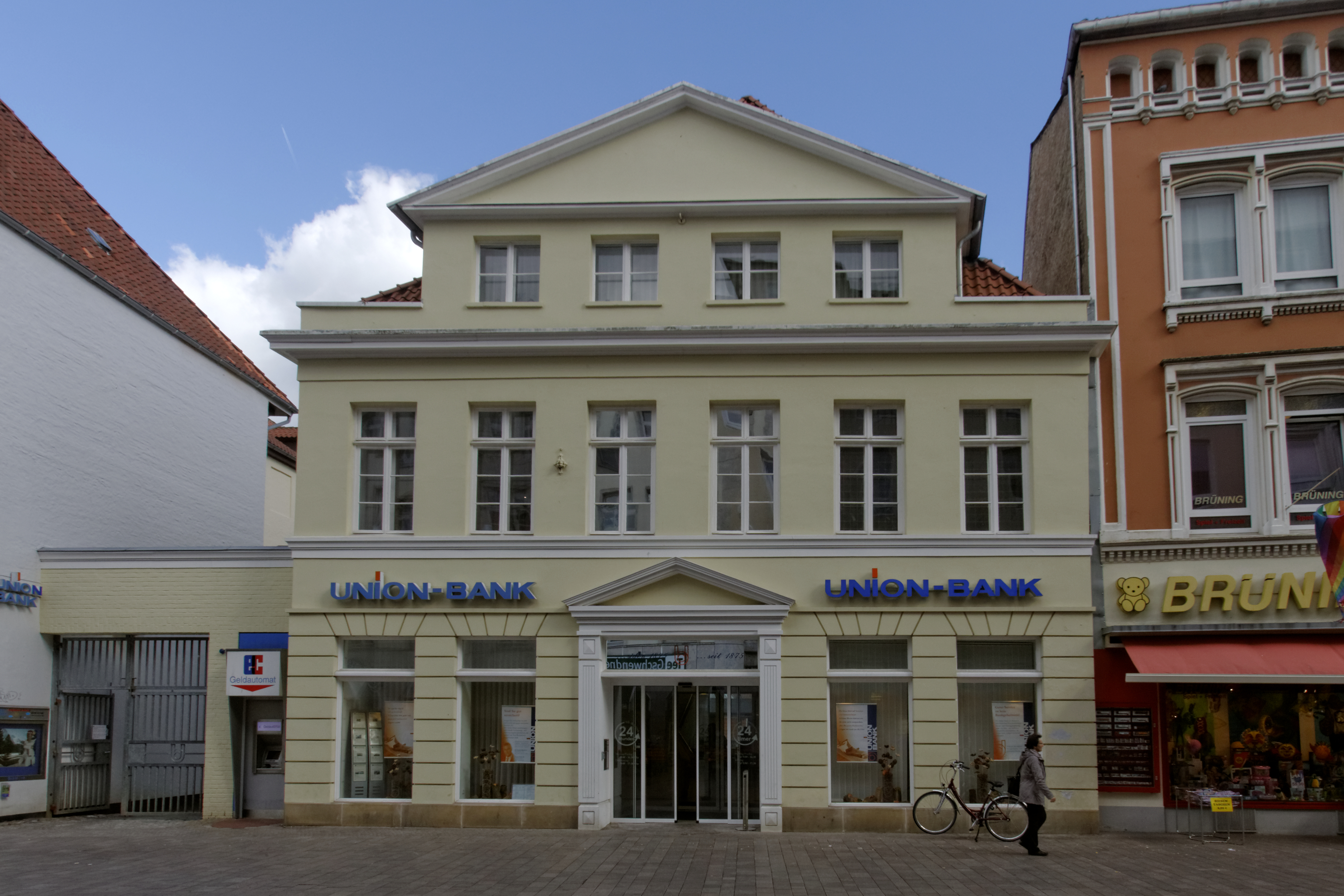 Flensburg, Große Str. 2; Kaufmannshof Vorderhaus